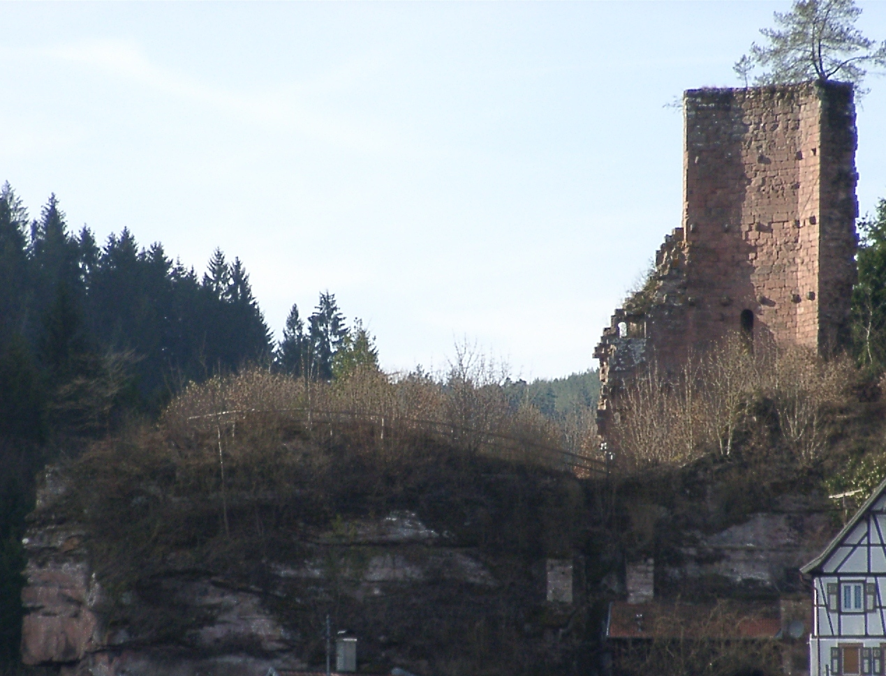 Ruine der Burg Elmstein